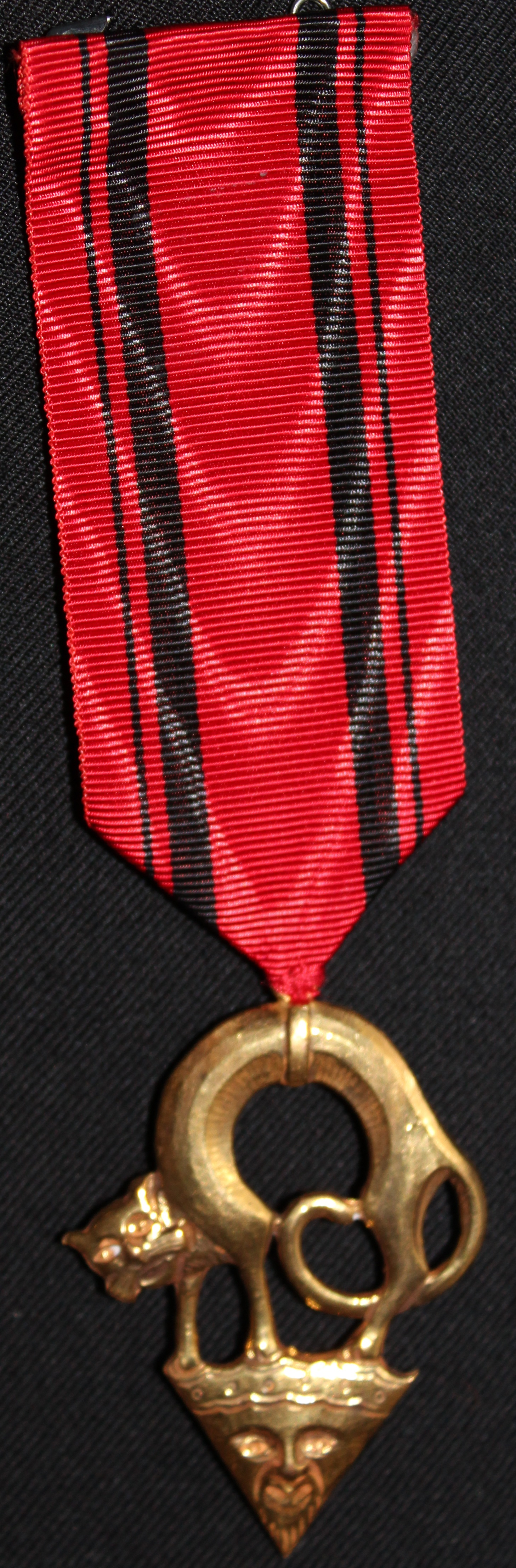 Ordenstegn for Riddere av studentordenen Den Gyldne Kat, tilknyttet Studentersamfundets Interne Teater ved Studentersamfundet i Trondhjem.